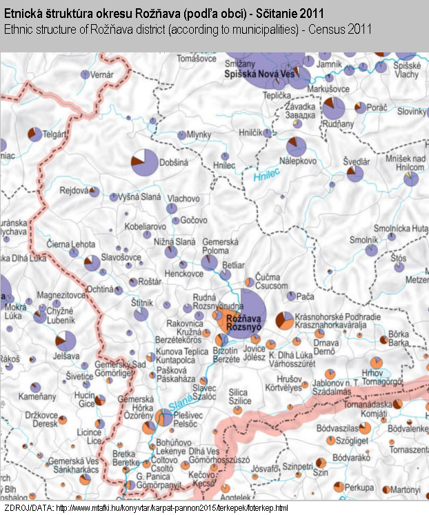 Národnostné zloženie okresu Rožňava v roku 2011